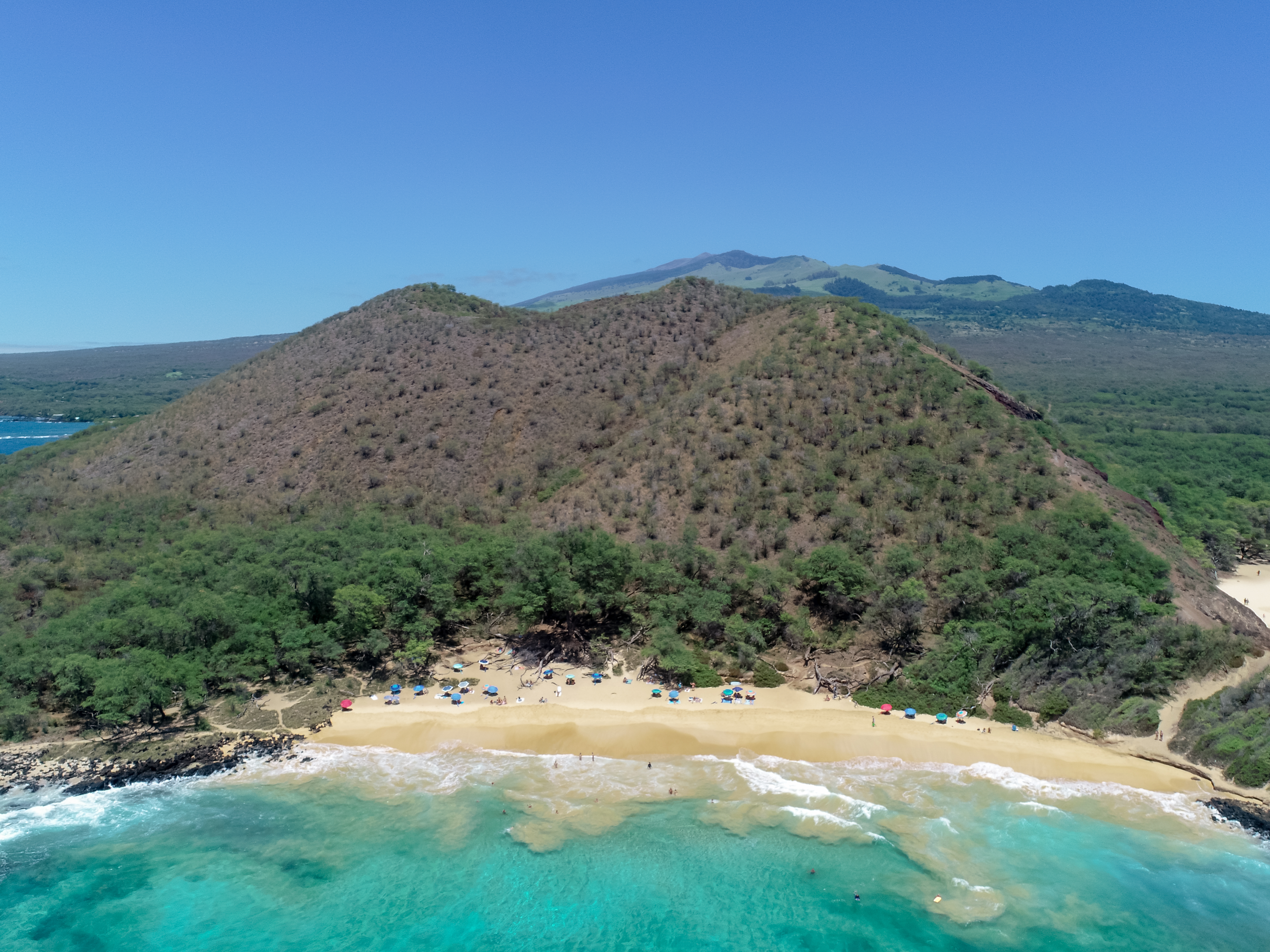 Hawaii Maui Makena Little Beach Luftbild